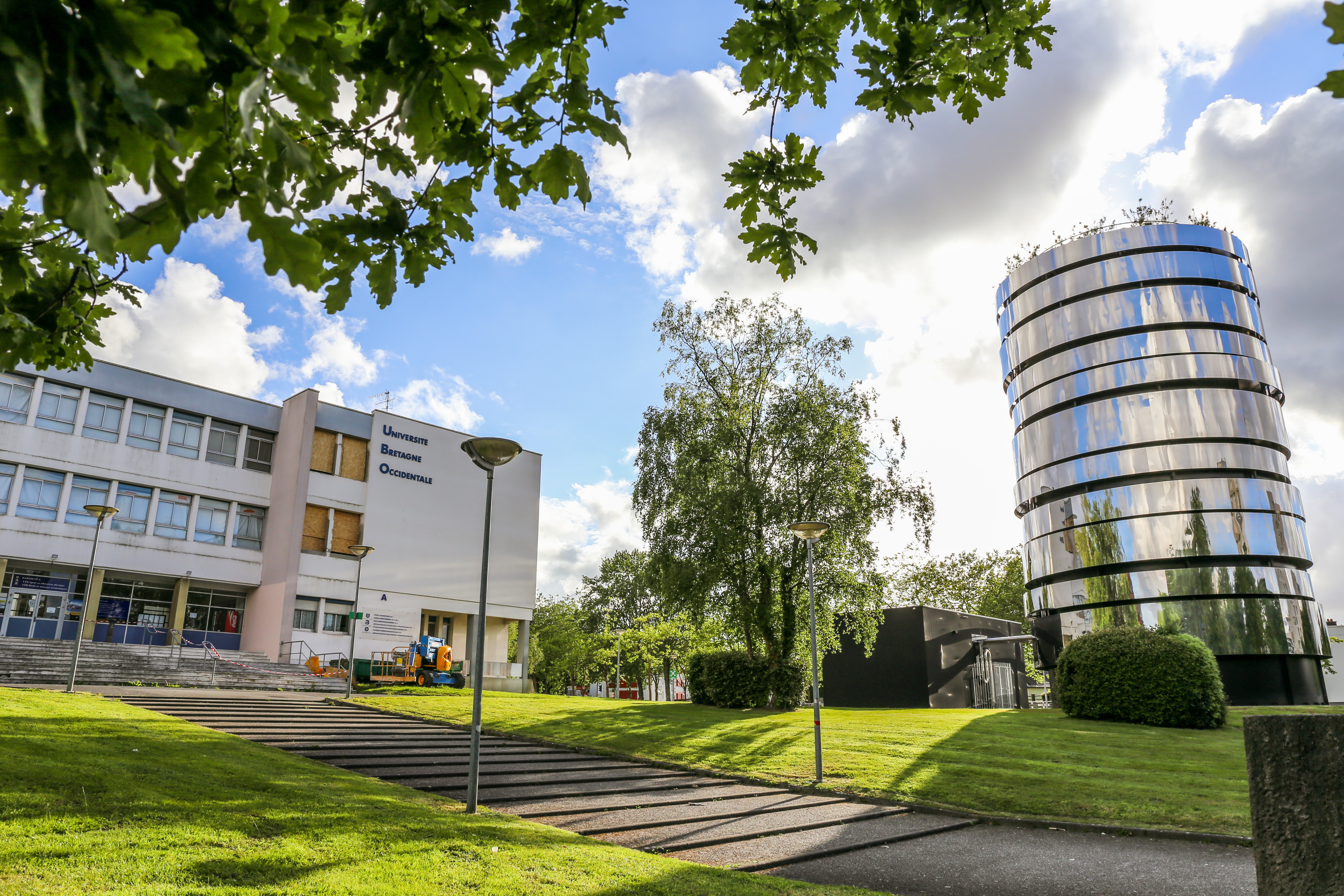 La "tour miroir" servant à stocker l'énergie thermique du campus du Bouguen de l'Université de Bretagne Occidentale, devant le bâtiment STAPS et sciences économiques, à Brest.